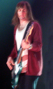 Mickey Madden.